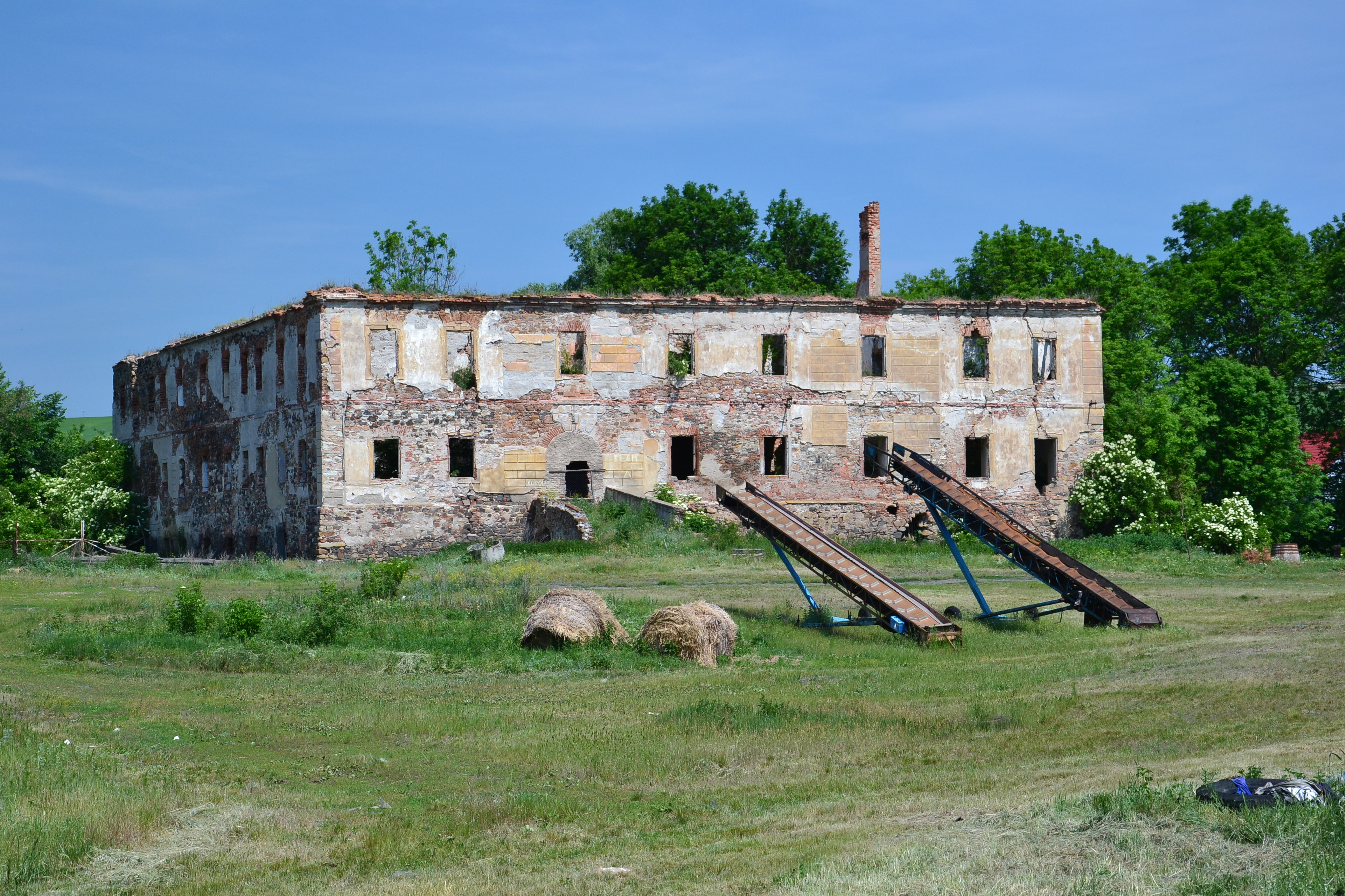 Torzo zámecké budovy